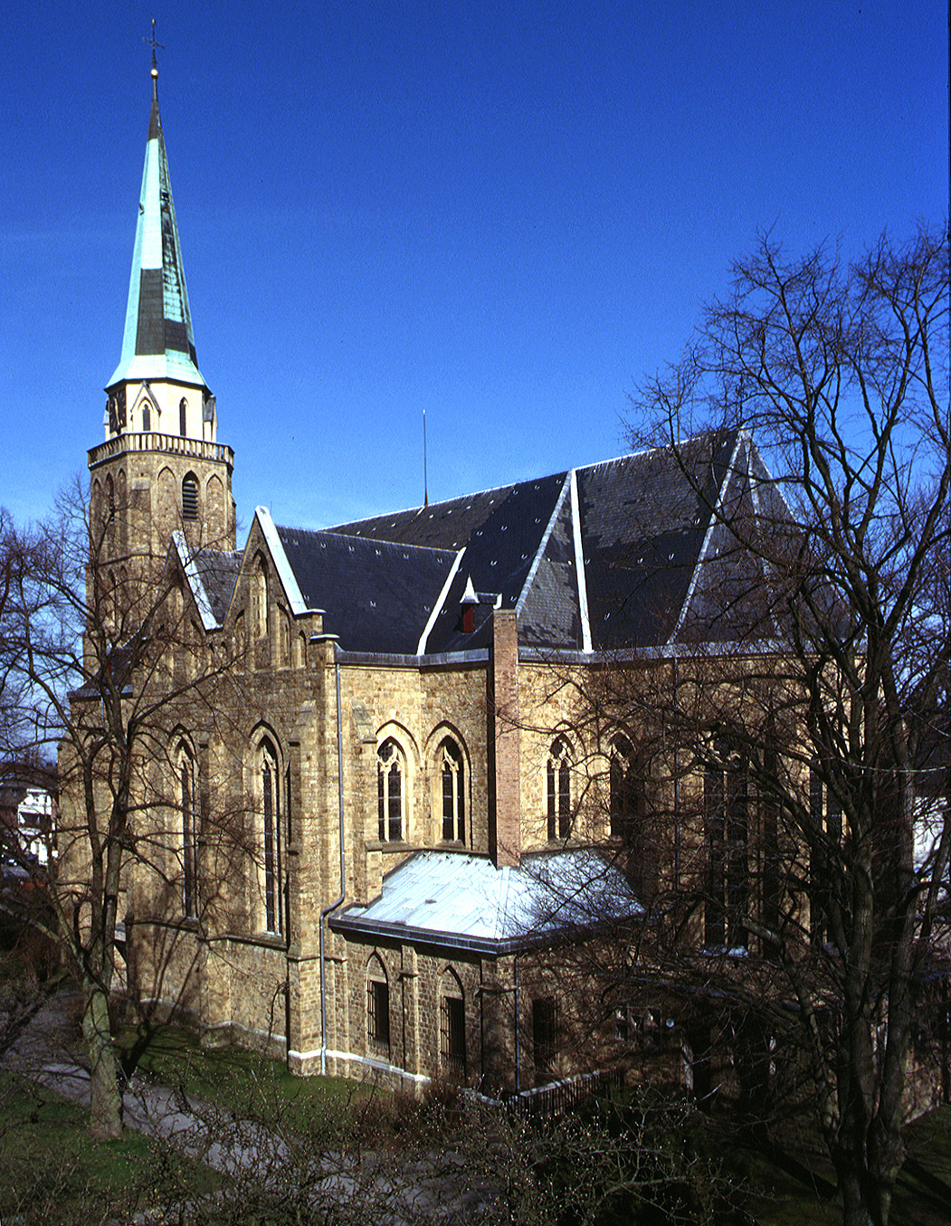 Aachen-Brand: Kath. Pfarrkirche St. Donatus (1879-83), Gesamtansicht nach NW